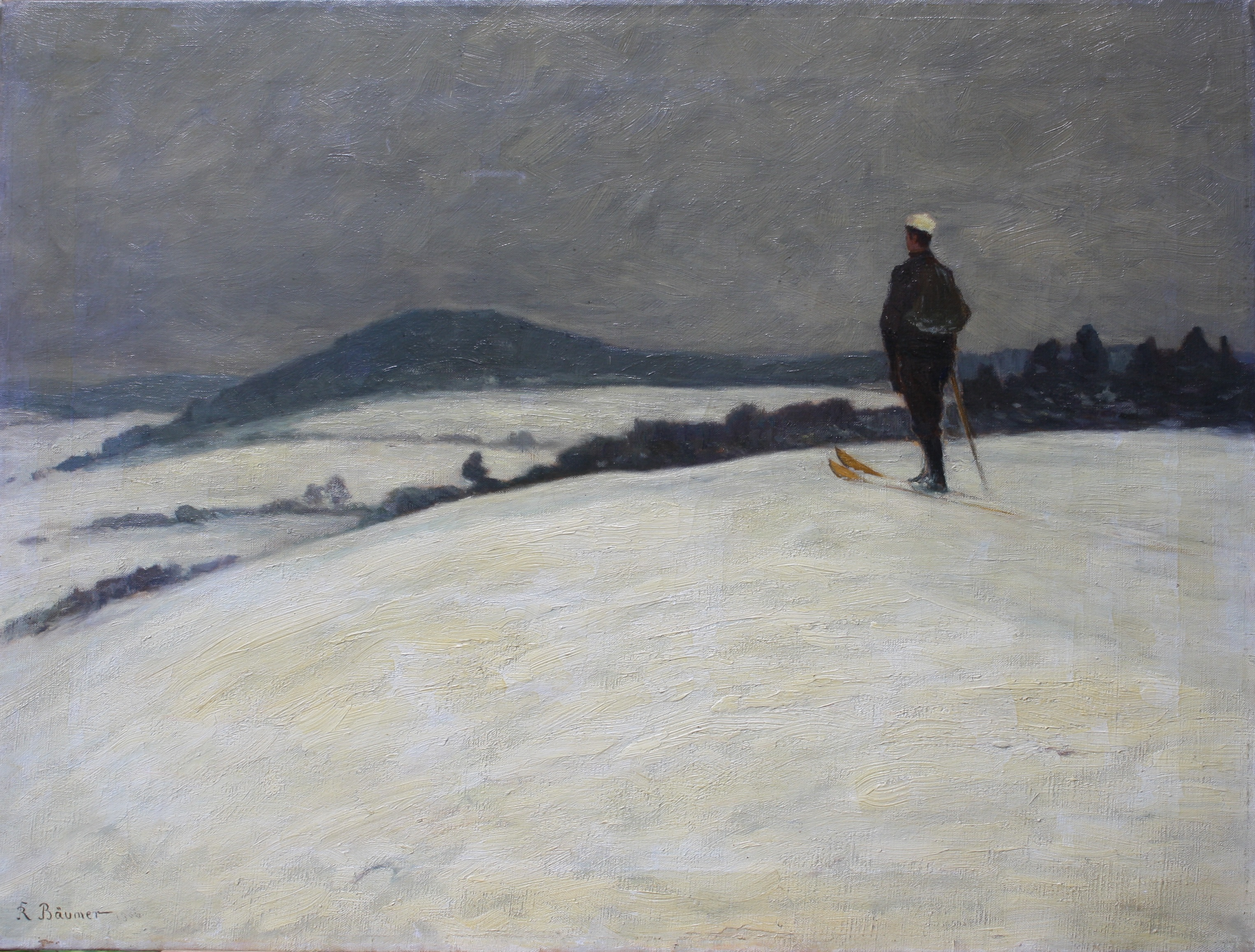 Ölgemälde auf Leinwand 55 x 73, Sign. u. li. R. Bäumer